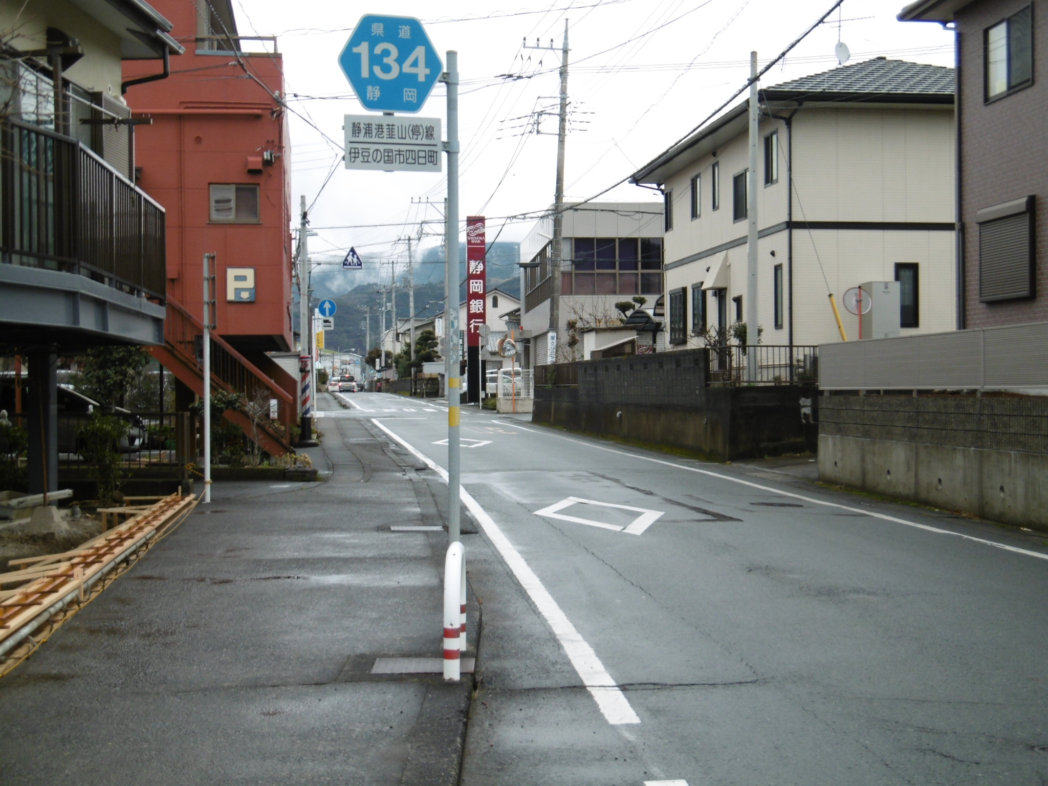 静岡県伊豆の国市四日町内の静岡県道134号静浦港韮山停車場線。画像は伊豆箱根鉄道駿豆線の韮山駅(奥方)に向かうこの県道の終点の韮山停車場付近である。